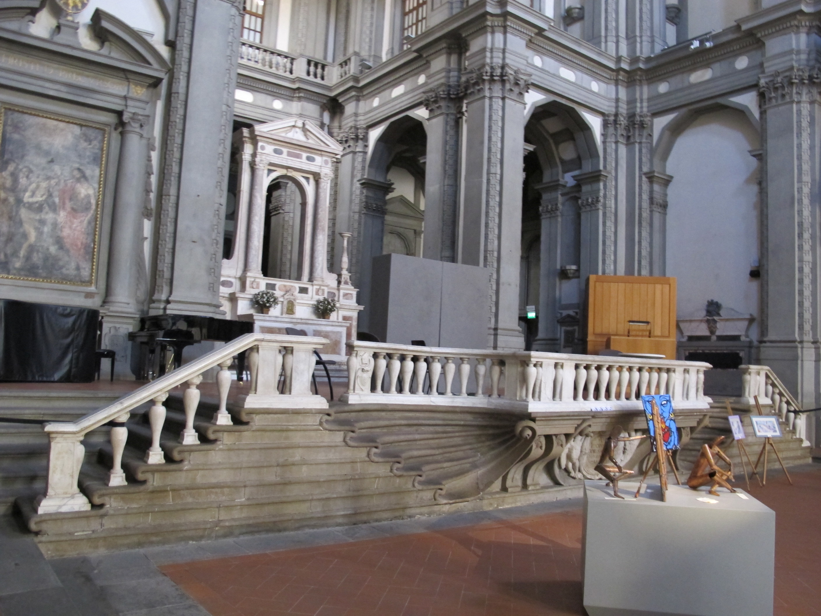 S. stefano al ponte, scalinata del buontalenti